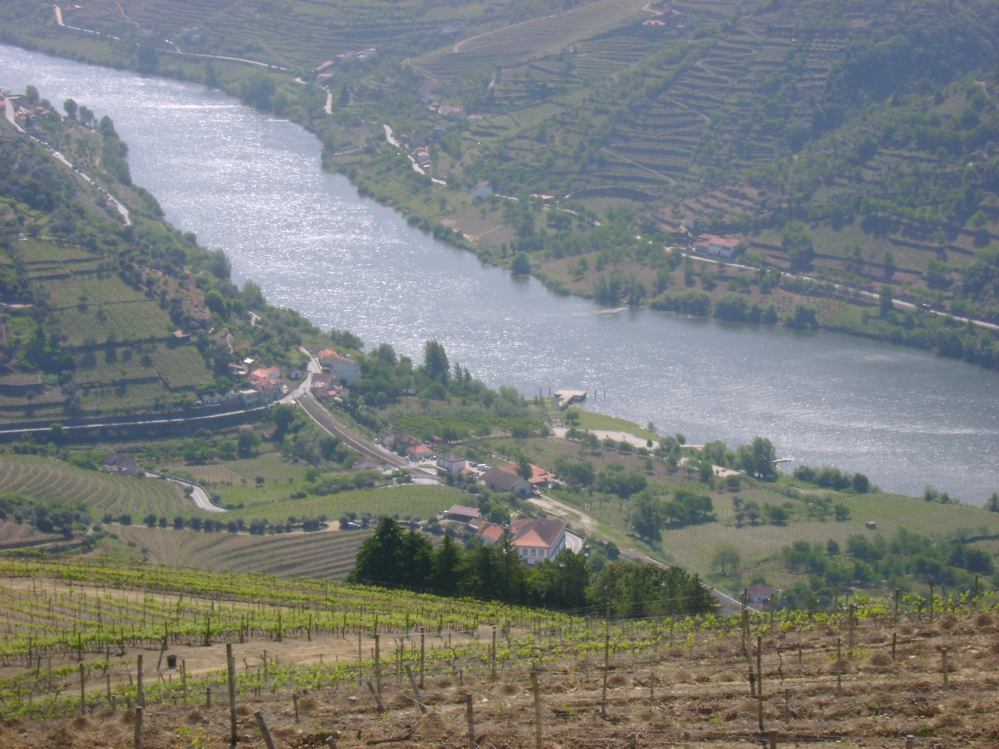 Rede, Mesão Frio, Portugal